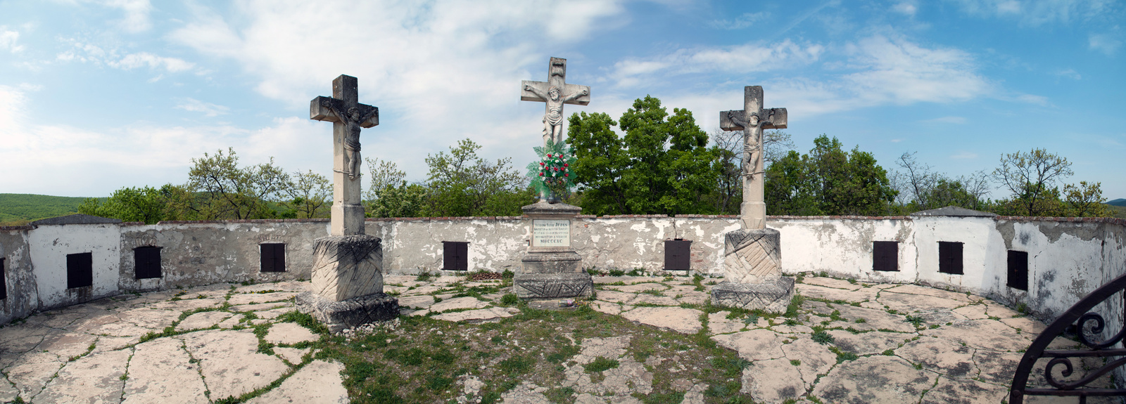 Kálvária (Buják, Kálvária-hegy) This is a photo of a monument in Hungary. Identifier: 6549